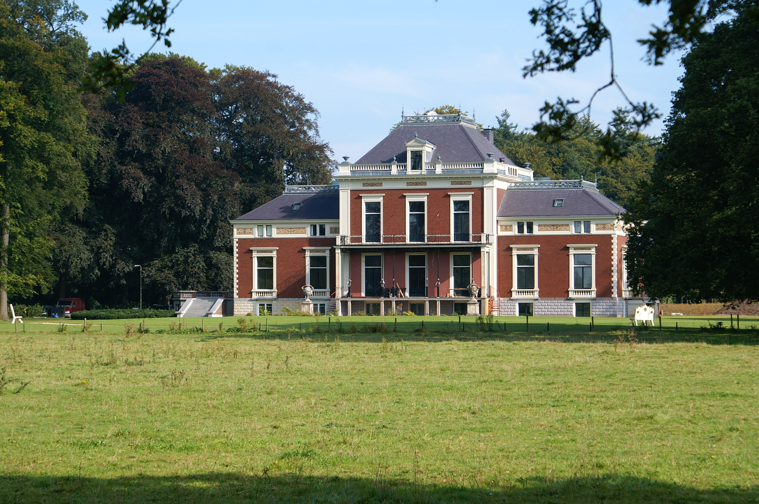 Huis Beerschoten te De Bilt.